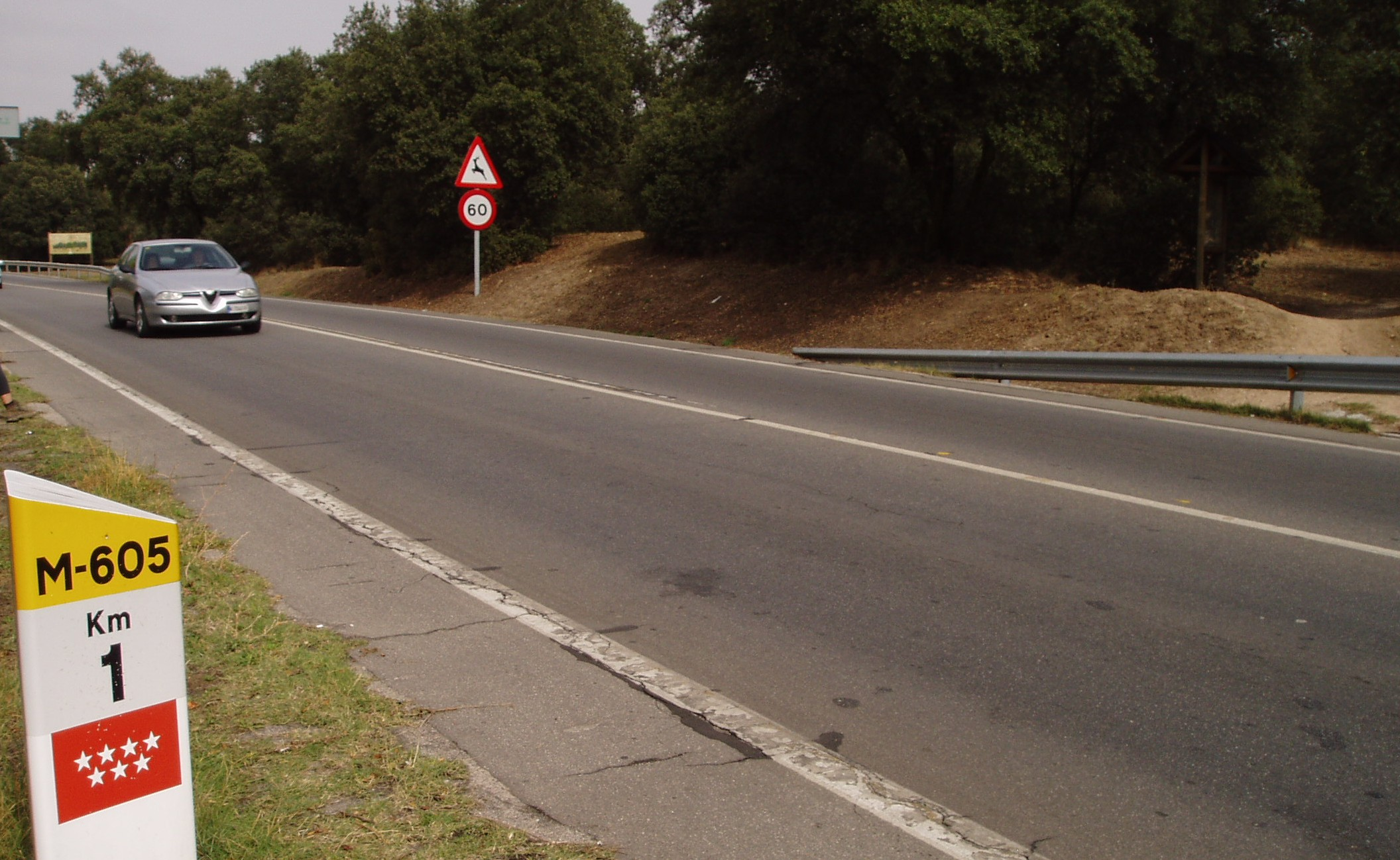 GR-124. Senda Real. Cruce carretera de El Pardo. Madrid. España